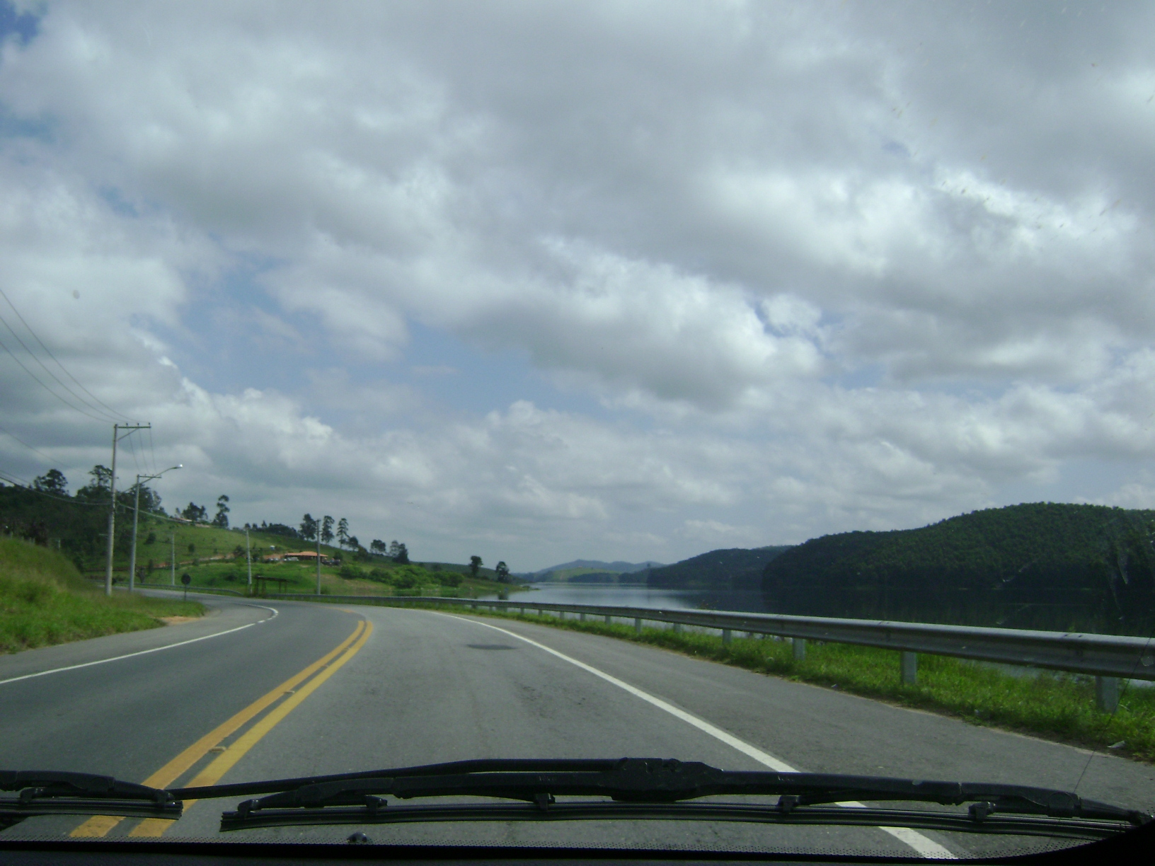 Rodovia Mogi-Salesópolis próxima à Salesópolis/SP com o Reservatório do Paraitinga ao fundo.